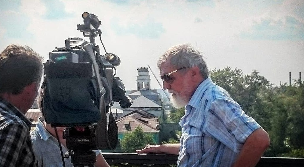 Евгений Фёдорович Шумилов даёт экстренное интервью на фоне пожара башни Главного корпуса ижевского оружейного завода. Ижевск, Площадь Оружейников, 3 июля 2018 года.